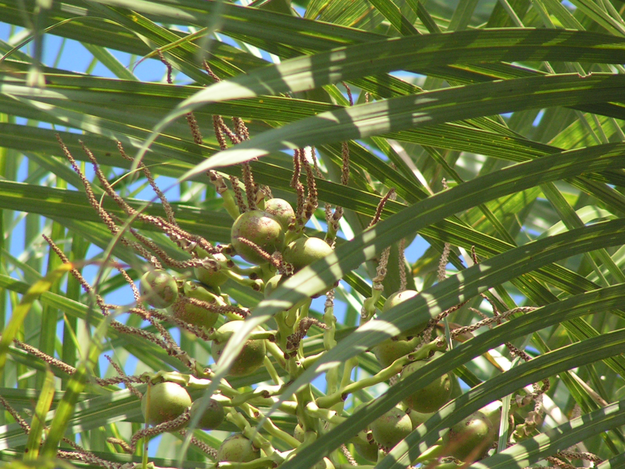 Frutos de Mbokaja o mbocayá (Acrocomia aculeata, syn. A. totai)